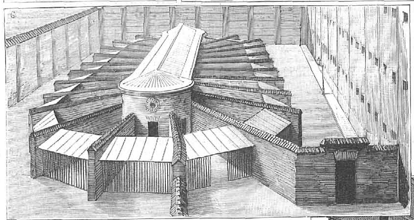 Interior de la Cárcel Modelo de Madrid, en la revista española La Ilustración Española y Americana.